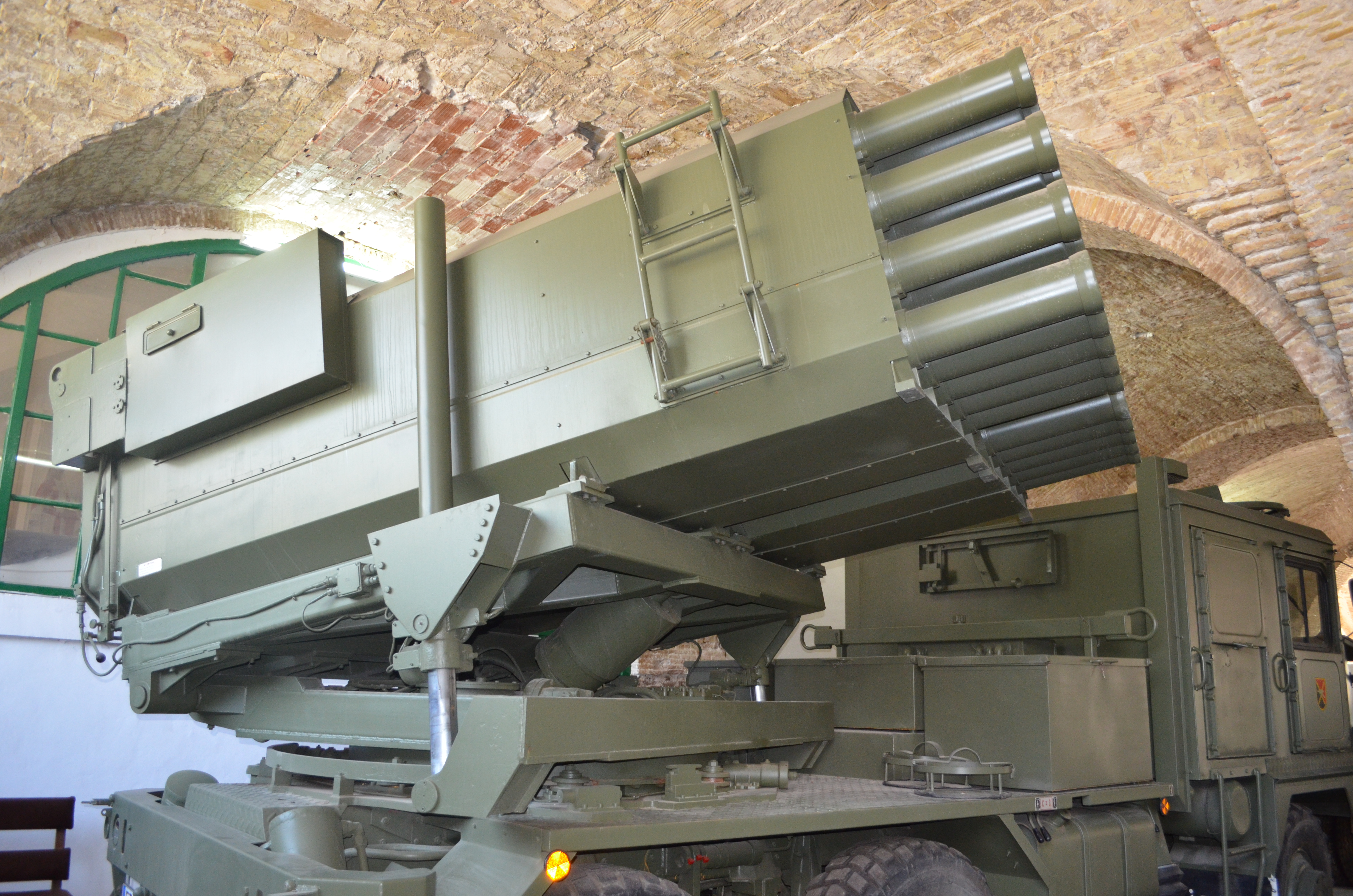 Lanzacohetes múltiple Teruel